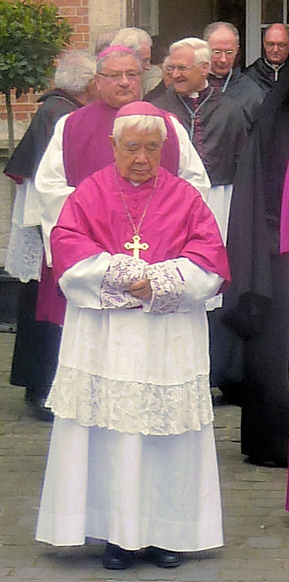 Hemelvaart 2015, bisschop Tapei, Mgr. Joseph Ti-kang.